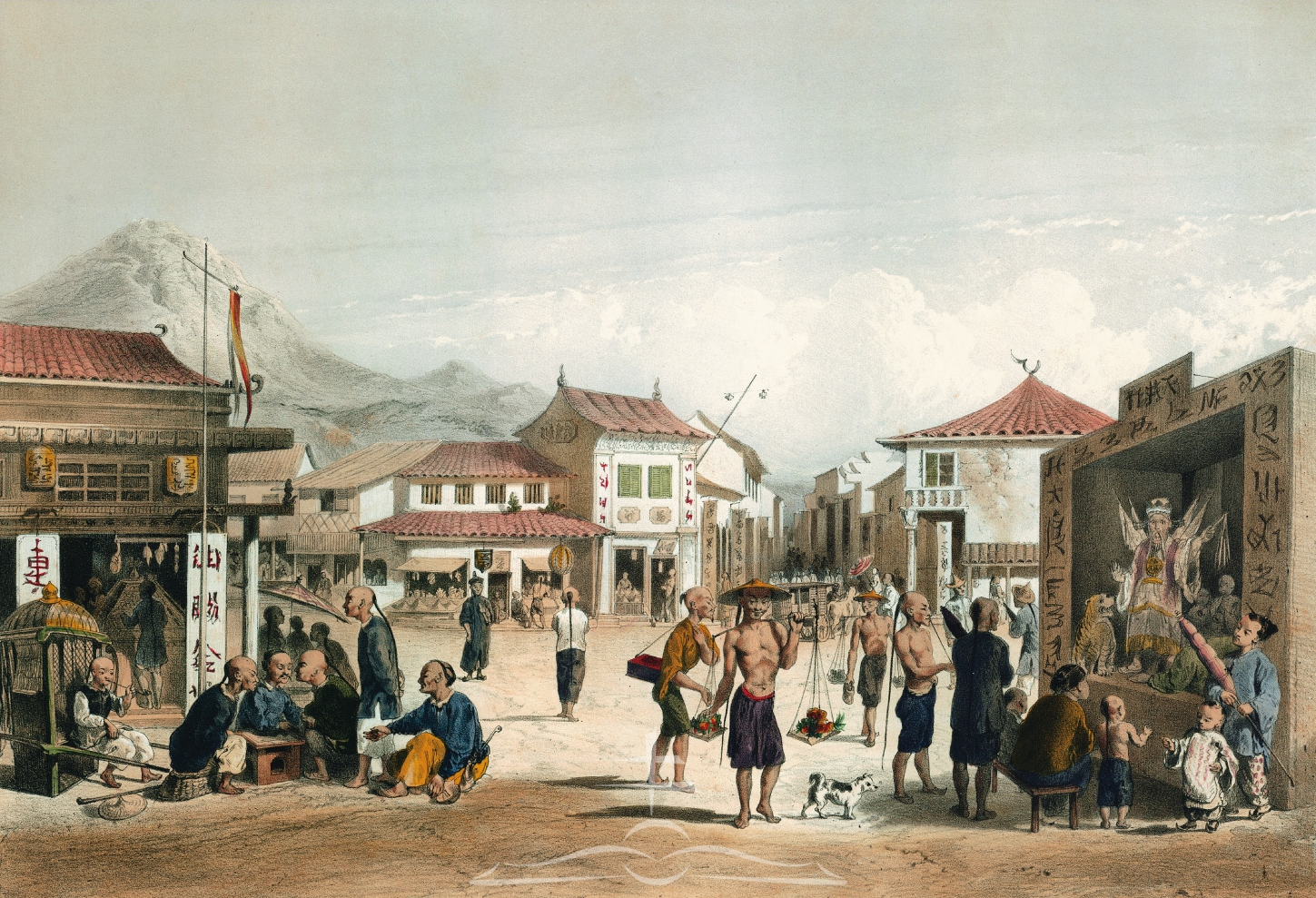 Kínai utca a 19. század közepén. Andrássy Manó illusztrációja.